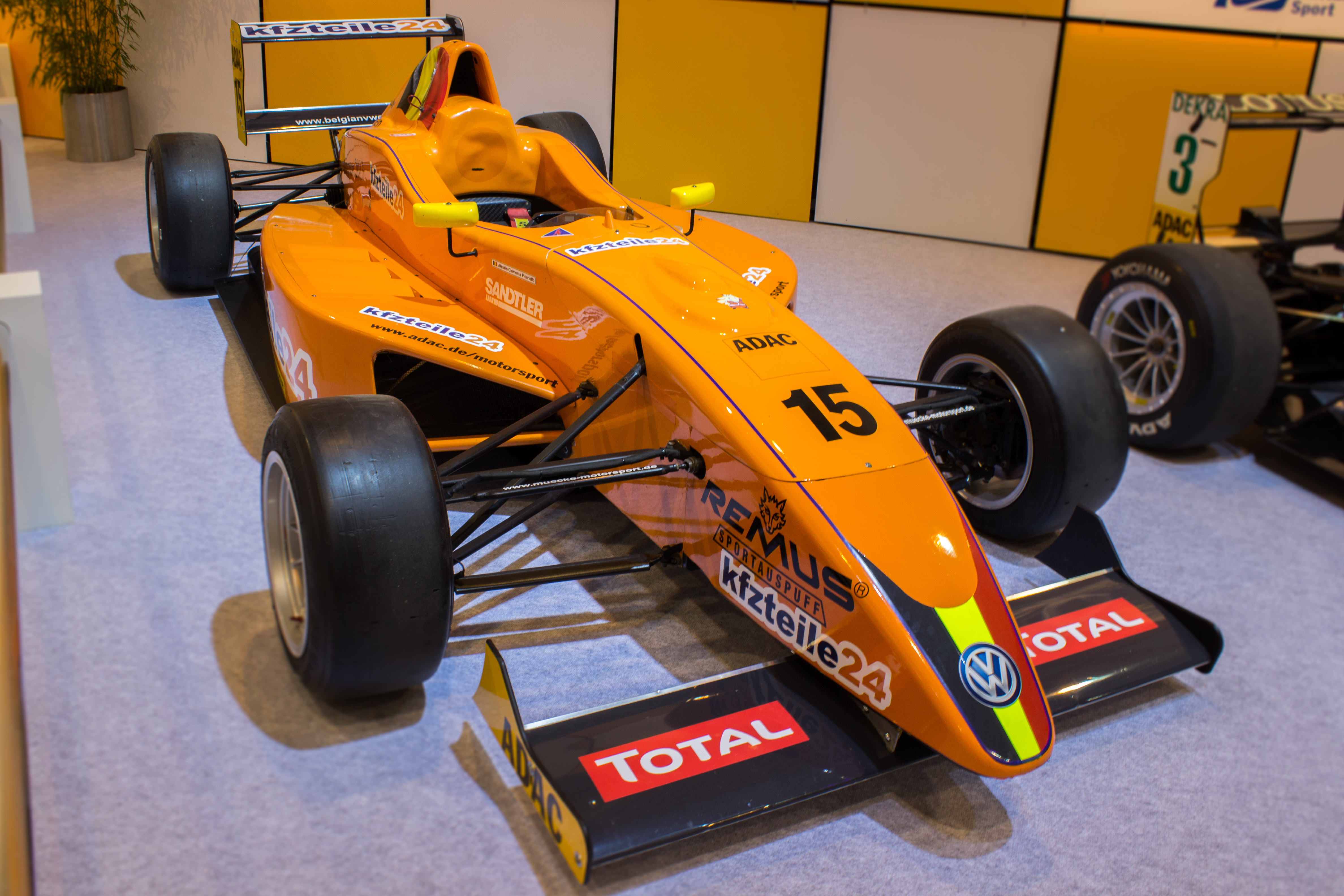 Der Dallara Formulino von Alessio Picariello, ausgestellt auf der Essen Motor Show 2013